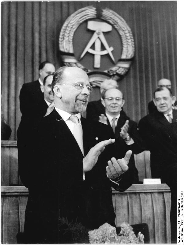 Zentralbild/Sturm- 12.9.1960 14. Volkskammersitzung in Berlin - Wahl des Staatsrates Auf der Tagesordnung der 14. Sitzung der Volkskammer der DDR, die am 12.9.1960 um 12 Uhr eröffnet wurde, steht das Gesetz über die Bildung des Staatsrates der Deutschen Demokratischen Repulik. UBz: Walter Ulbricht dankt für das Vertrauen, das ihm durch die Wahl zum Vorsitzenden des Staatsrates bekundet wurde.